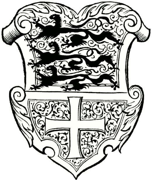 Dieses Wappen des Schwäbischen Kreises zeigt oben die drei Löwen des Herzogtums Schwaben, unten das Kreuz des Hochstifts Konstanz.